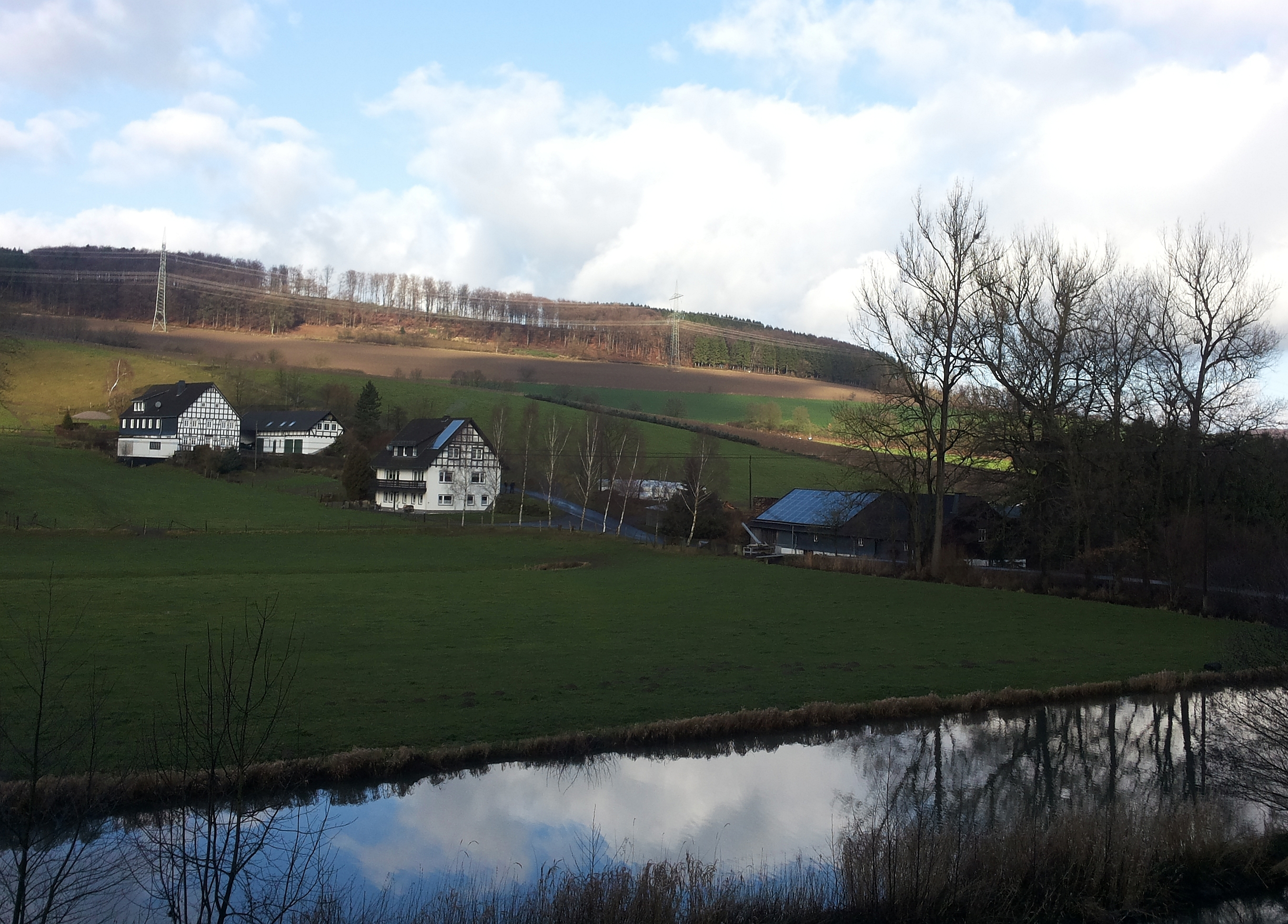 Arper Mühle bei Arpe, im Vordergrund der Fluss Arpe (Germany)